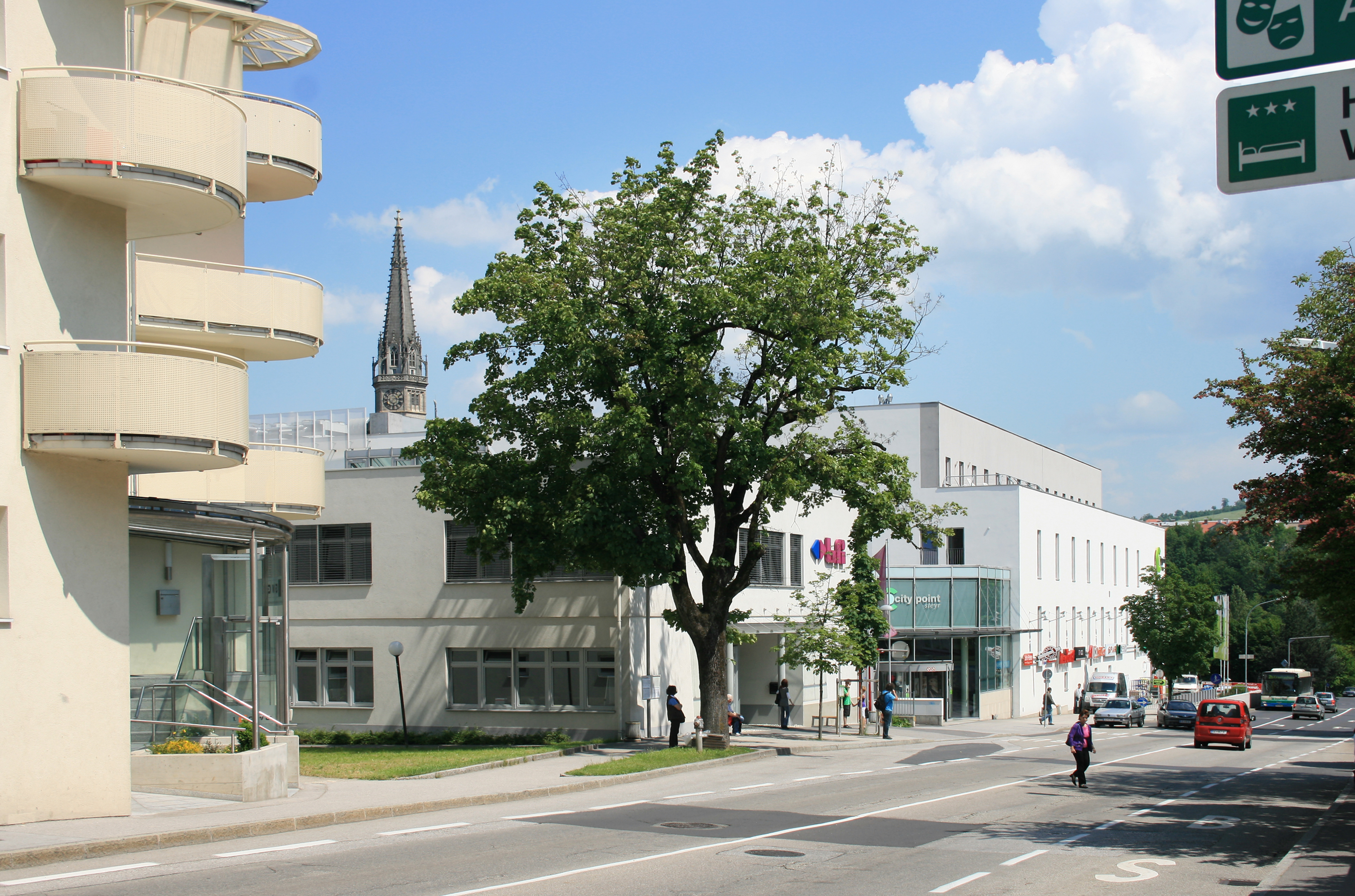 Die Tomitzstraße in Steyr mit BFI und City-point-Kaufhaus. Der neugotische Turm im Hintergrund links gehört zur Stadtpfarrkirche